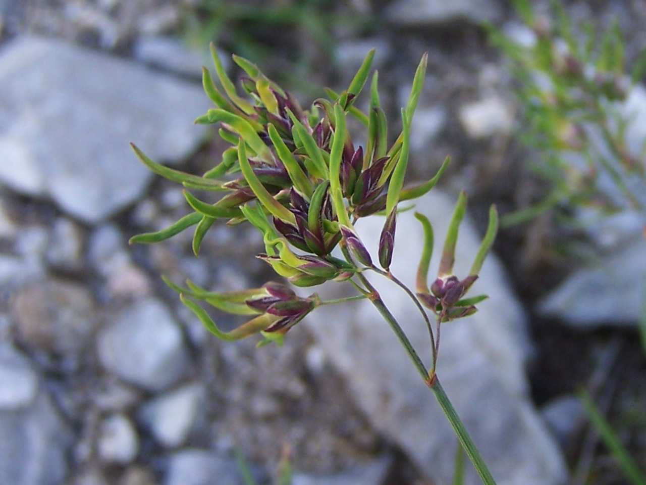 Poa alpina subsp. vivipara (pl. wiechlina alpejska, f. żyworodna)